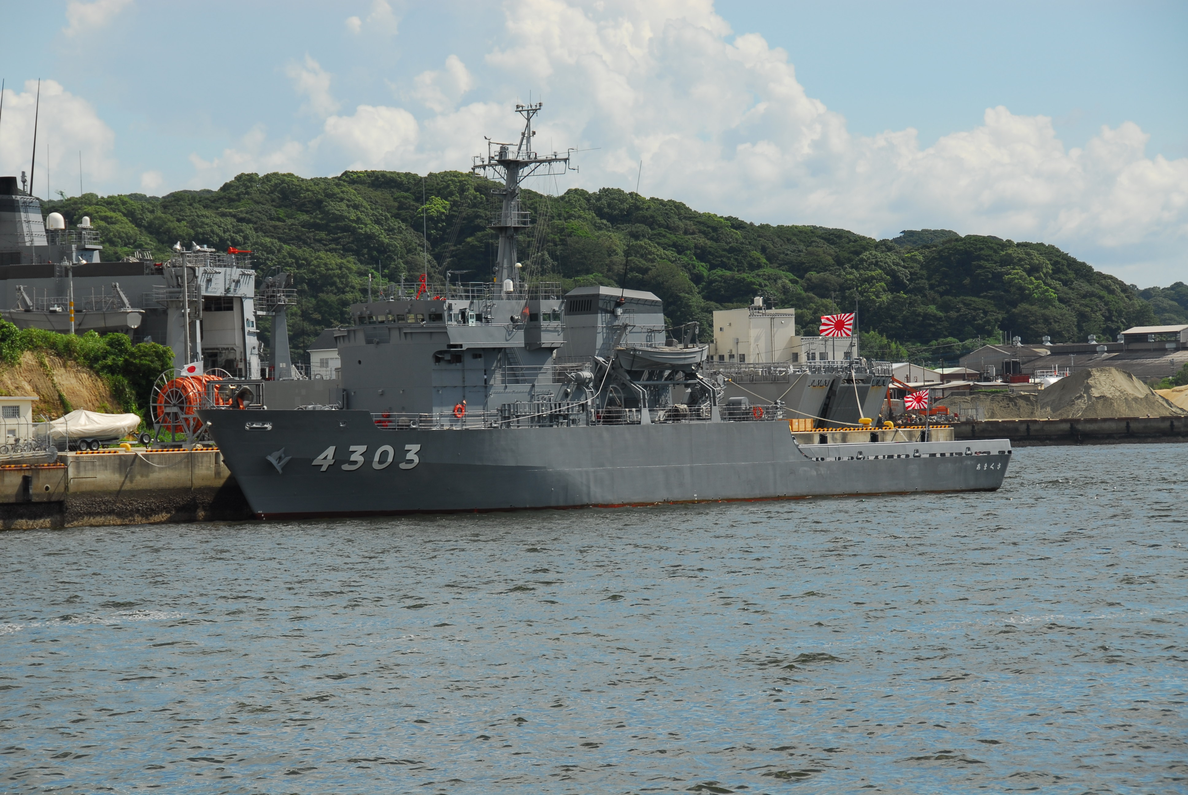 支援艦あまくさ。佐世保・倉島岩壁に繋留中。